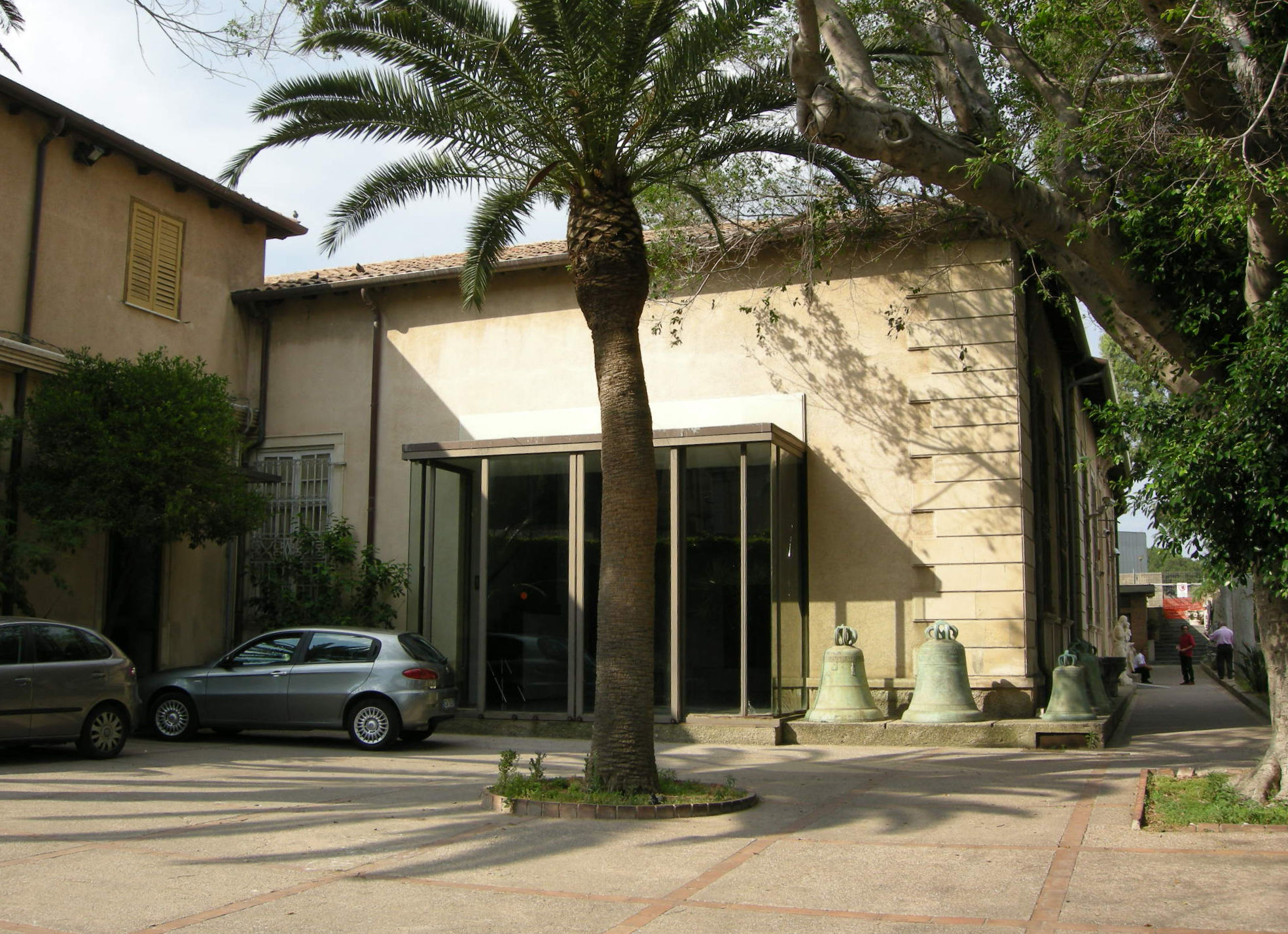 Museo regionale di messina, ingresso